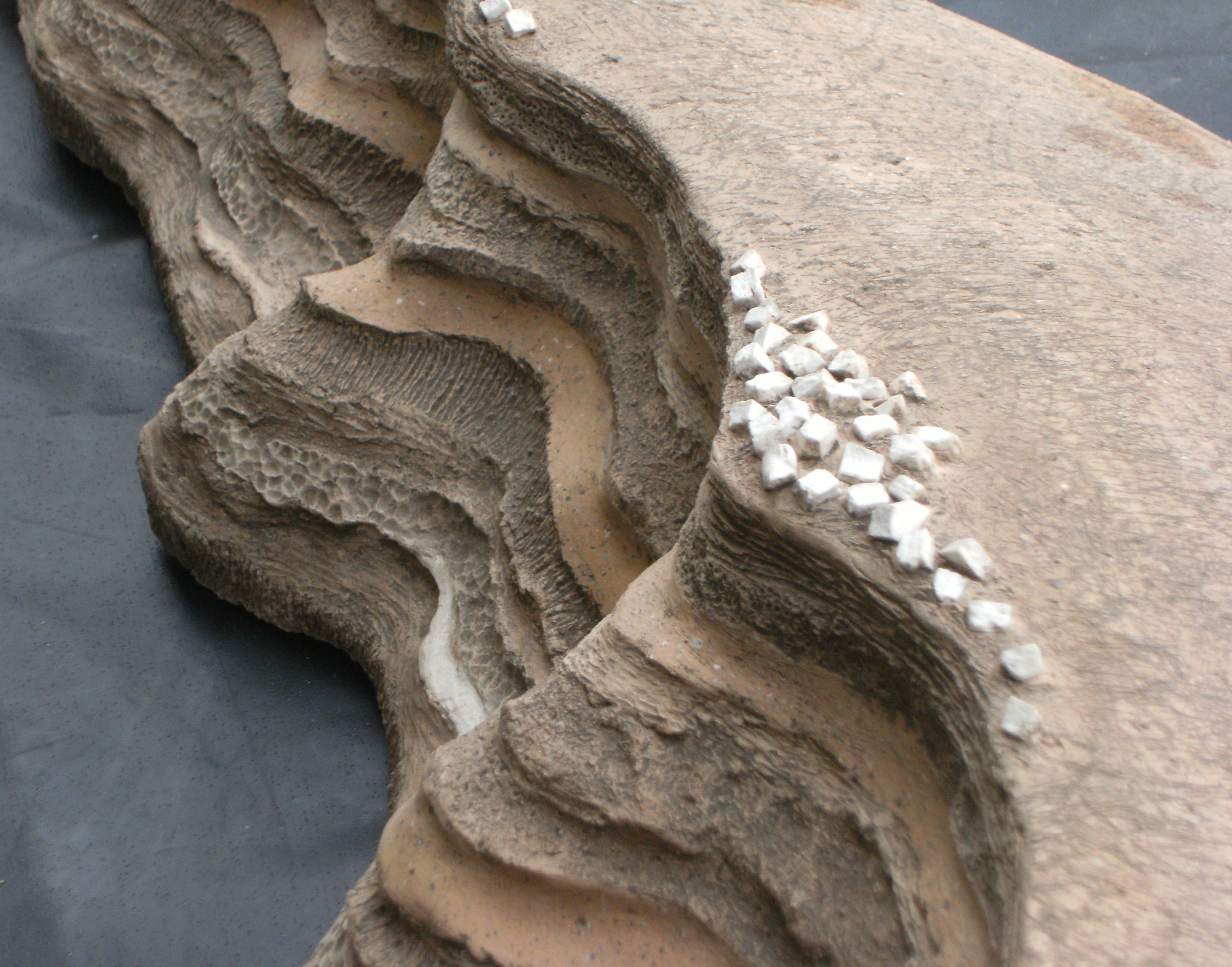 Ceramika artystyczna, autorka Krystyna Andrzejewska-Marek.